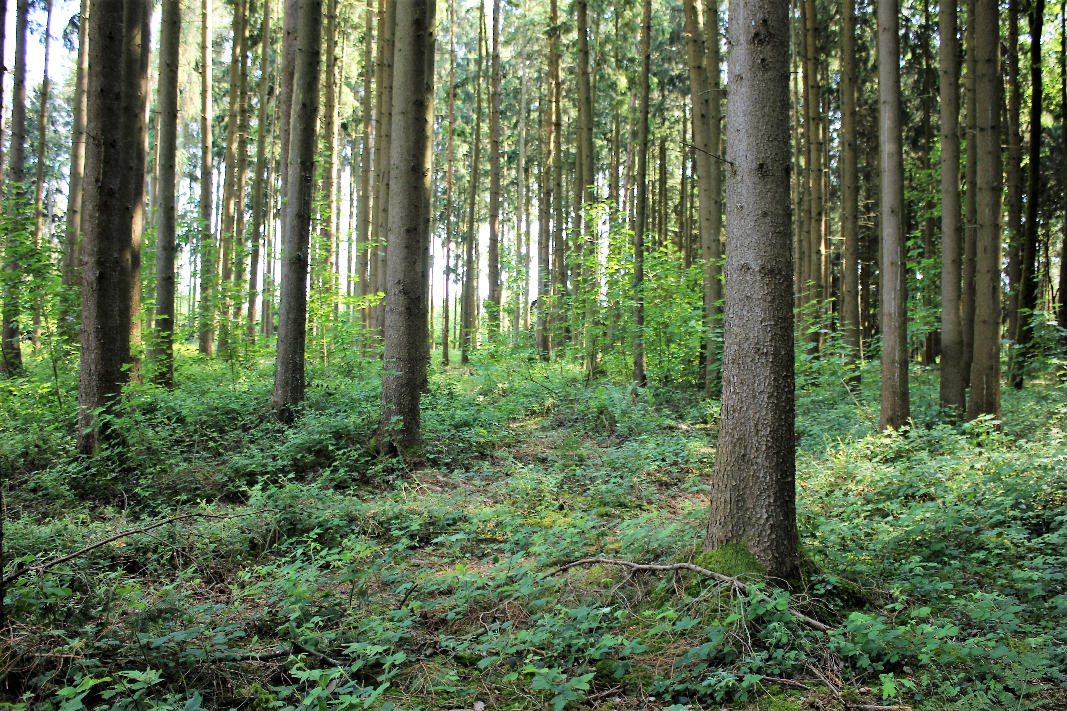 Das Landschaftsschutzgebiet "Schlossberg" liegt südlich der Ortschaft Metting im Landkreis Straubing-Bogen. Das Schutzgebiet besteht seit 1981 und hat die Nummer LSG-00323.01; WDPA: 395810.